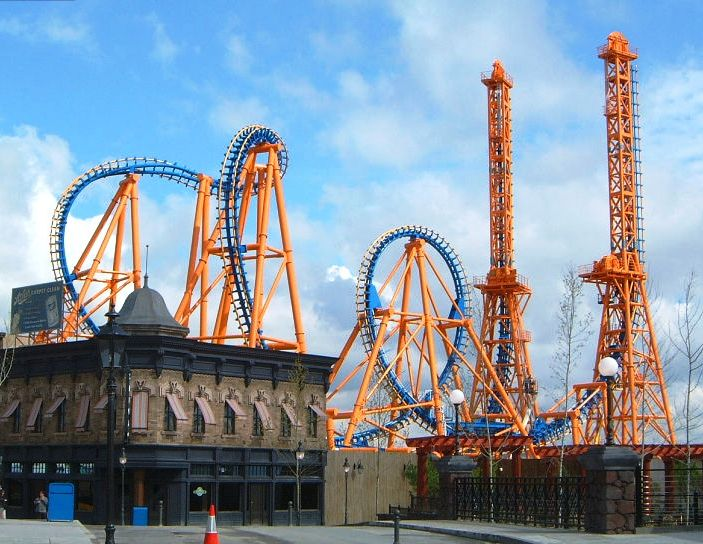 Panoramica de la atraccion Stunt Fall